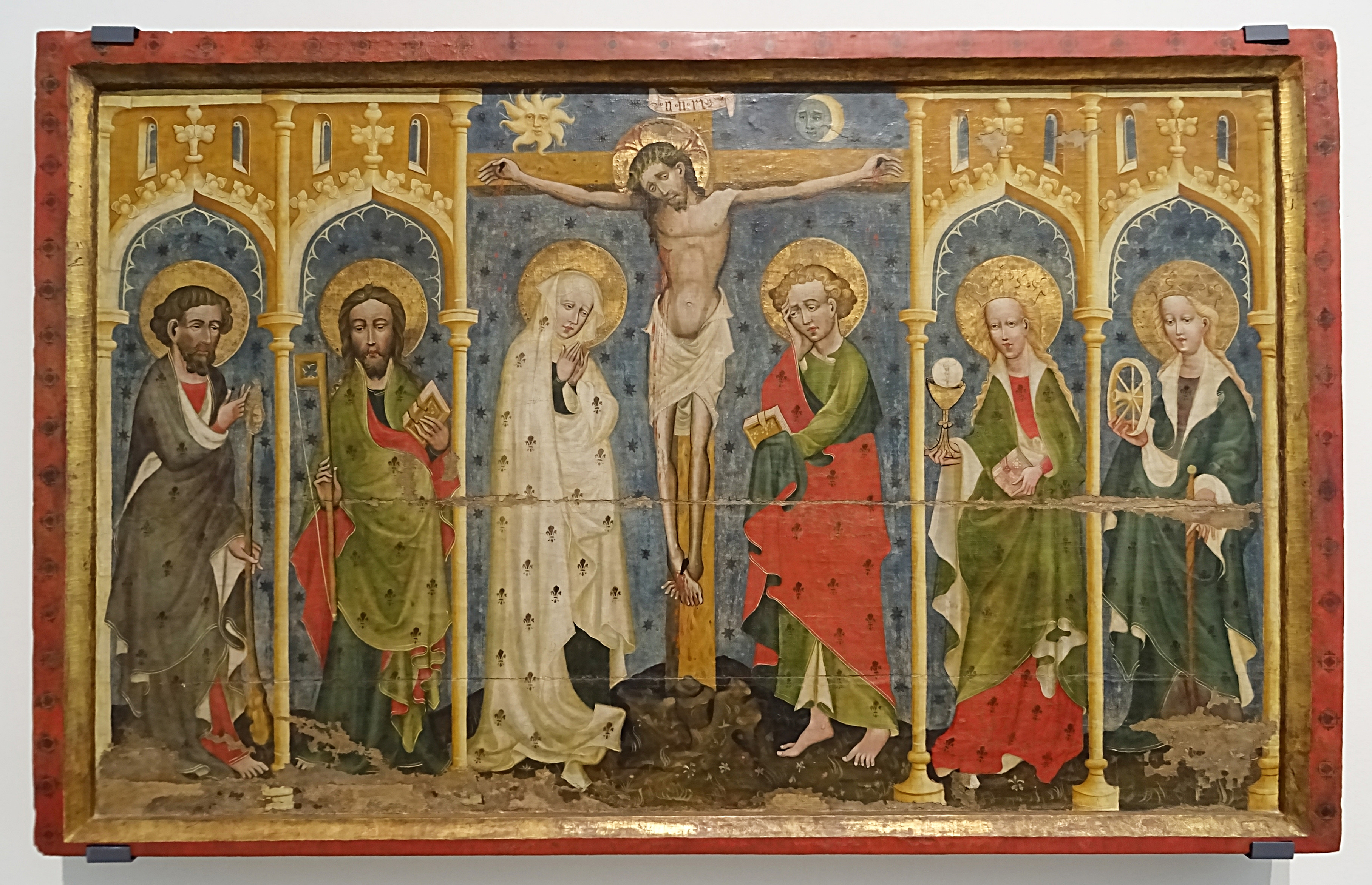 Mitteltafel eines Flügelaltares aus der Kirche St. Peter und Paul in Tiefthal mit Kreuzigungs-Szene und Heiligen, Fichtenholz mit Leinwandkaschierung um 1420, das Original befindet sich im Angermuseum Erfurt